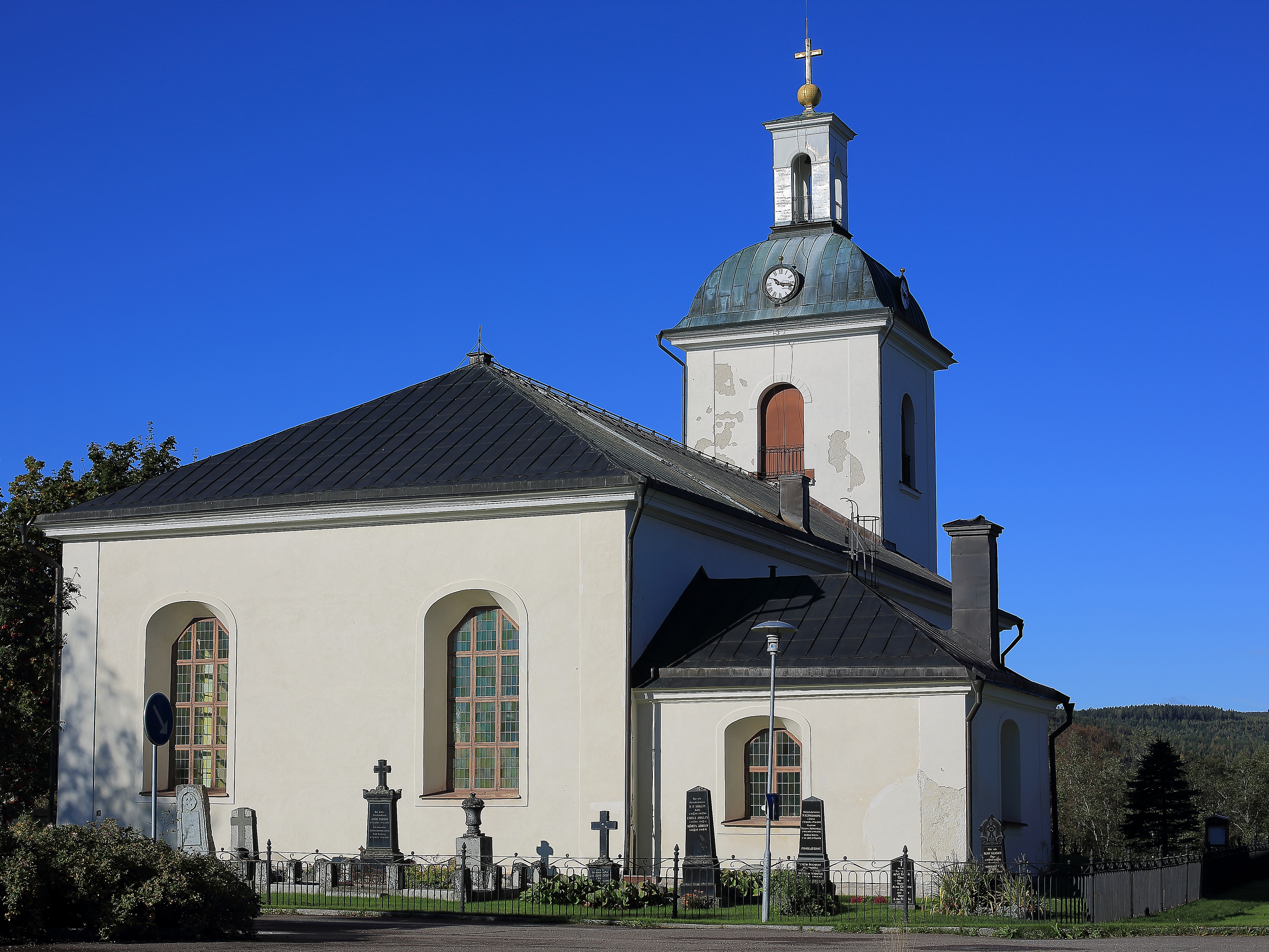 Indals kyrka (Glömsta 1:26)